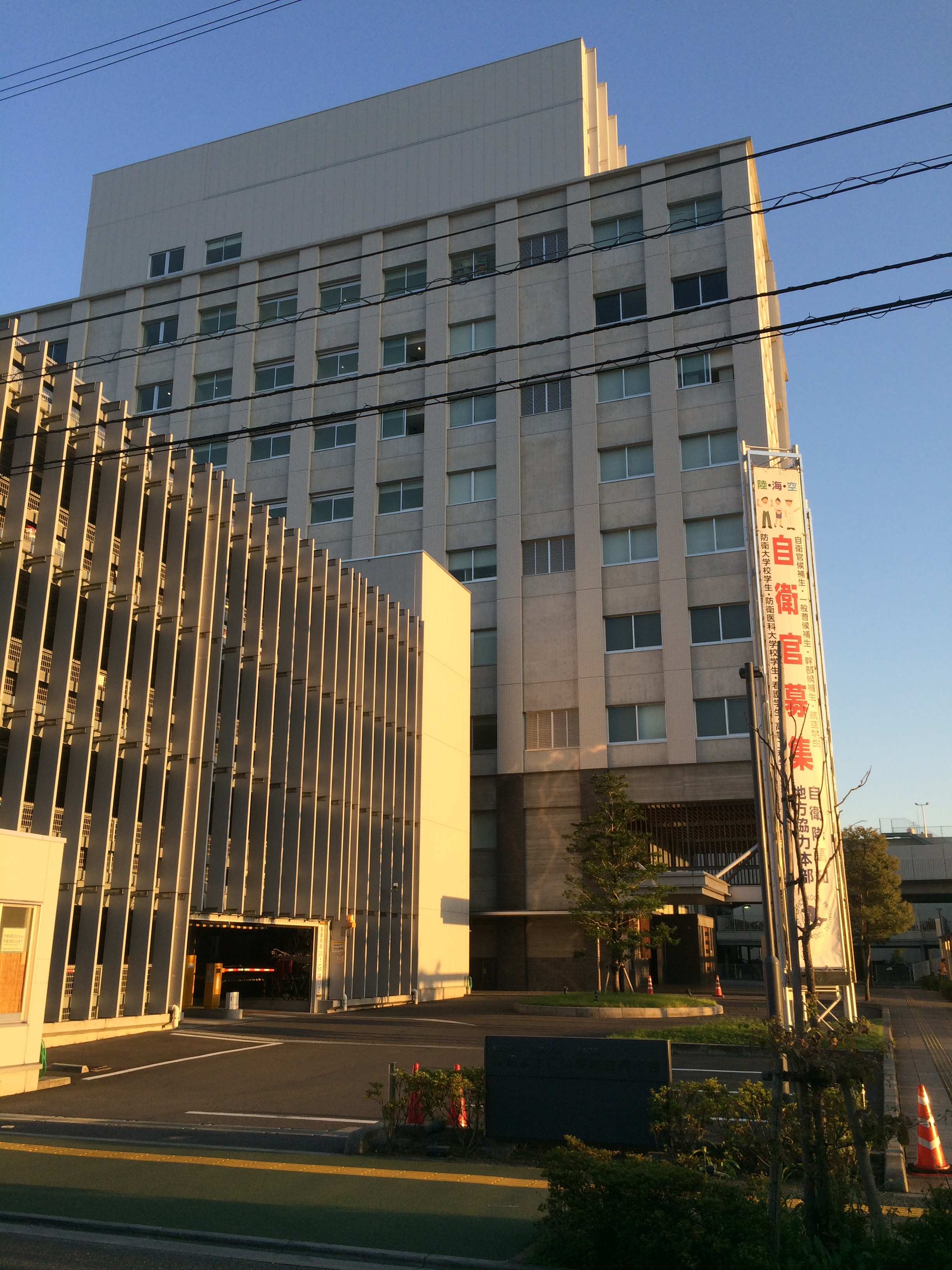 高知よさこい咲都合同庁舎（高知地方法務局、四国財務局高知財務事務所、高松国税局高知税務署、自衛隊高知地方協力本部）